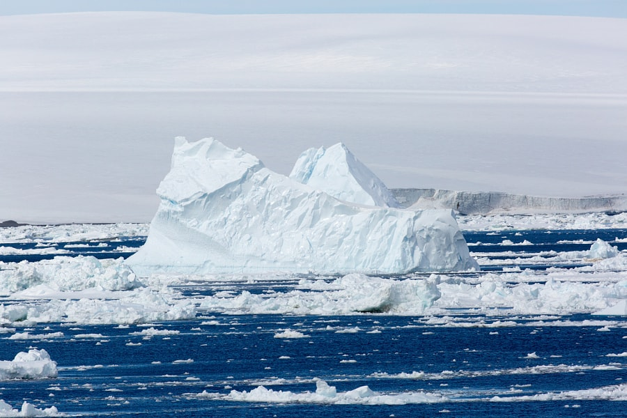 Айсберг в Антарктической проливе